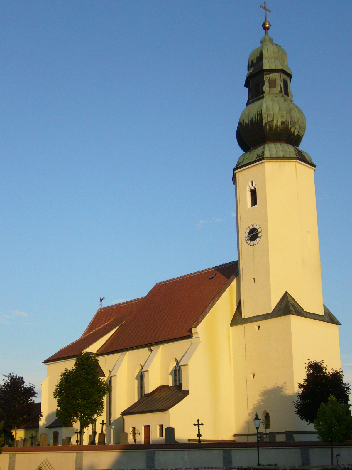 Kath. Pfarrkirche hl. Veit, Wolfsbach